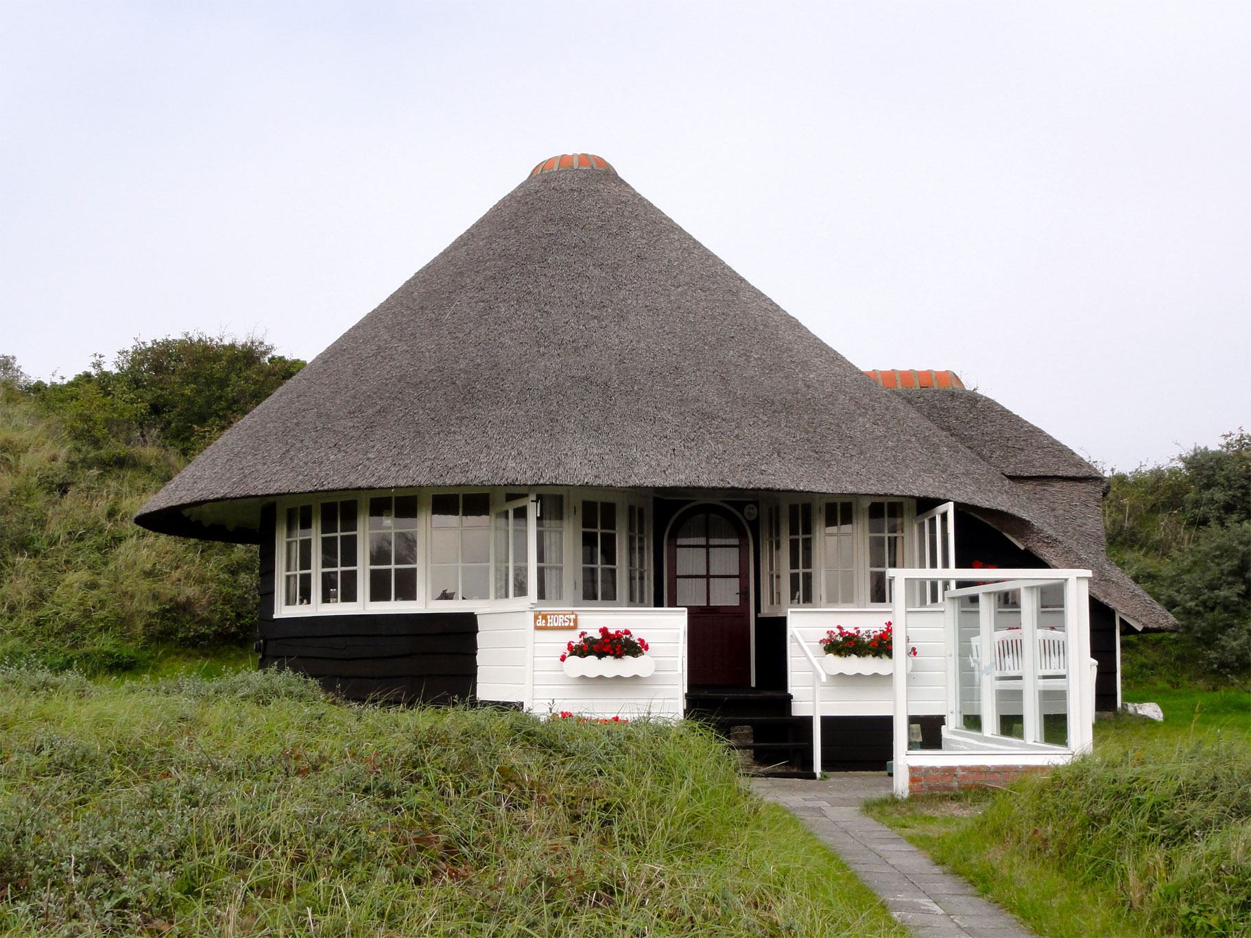 De Horst Vuurtorenpad 24in Schiermonnikoog